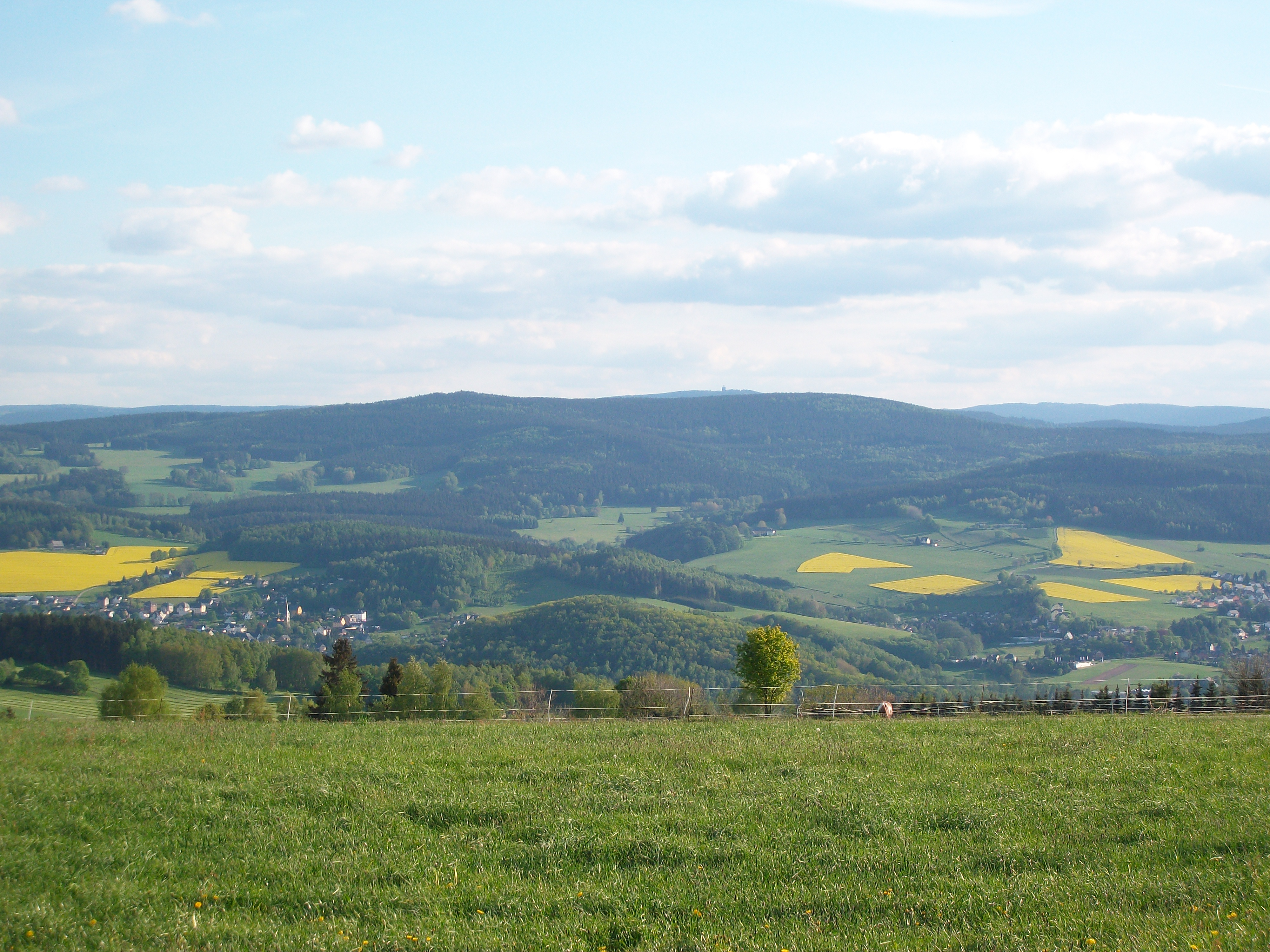 Bernsbach, Blick zu Morgenleithe und Auersberg (2016)